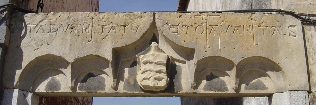 Portal da Gafaria em Setúbal